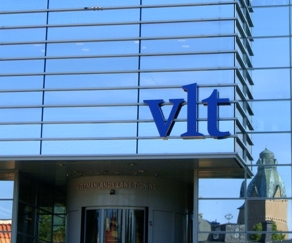 Fasaden till Vestmanlands_Läns_Tidning i Västerås.